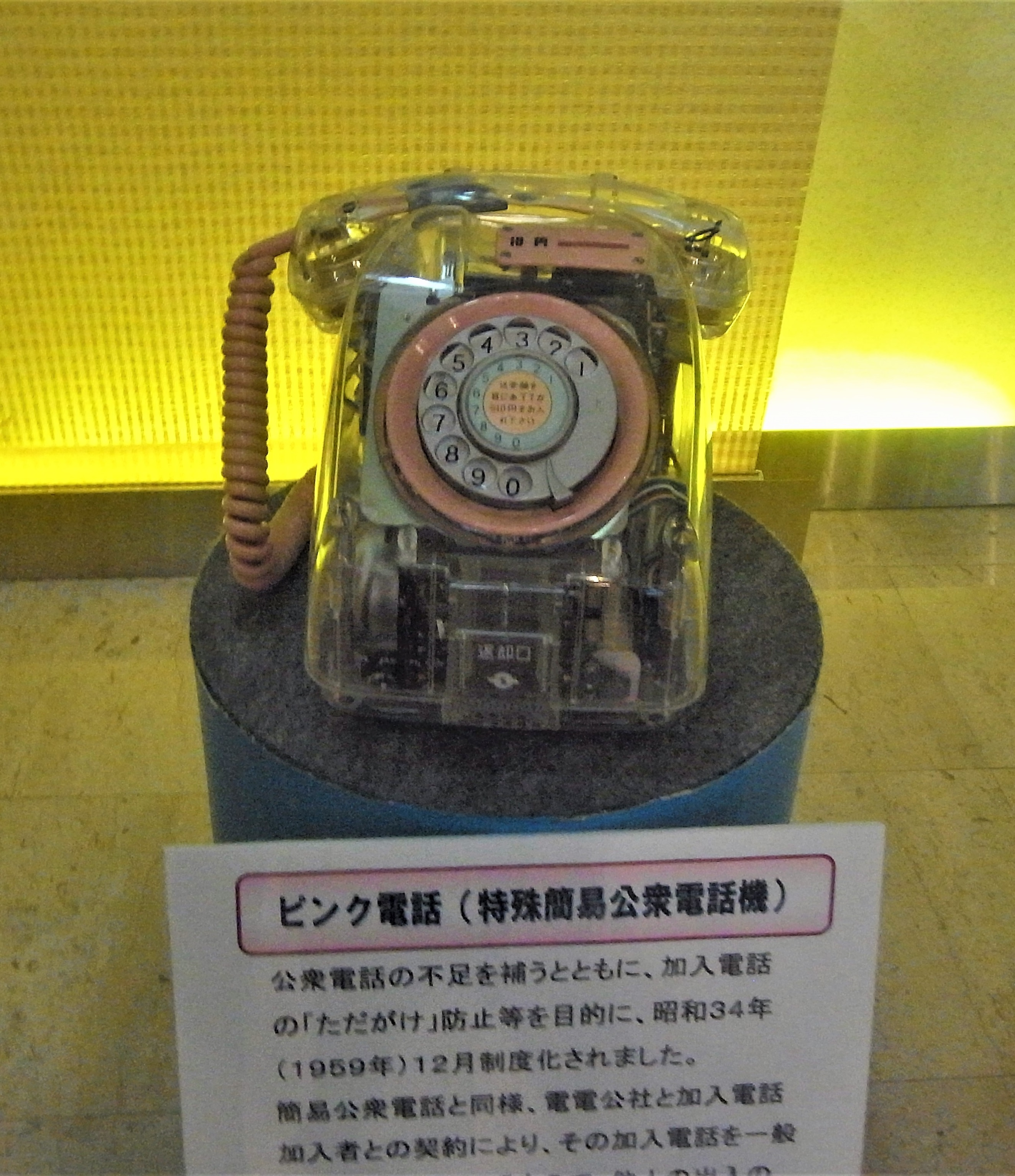 透明なピンク電話です。